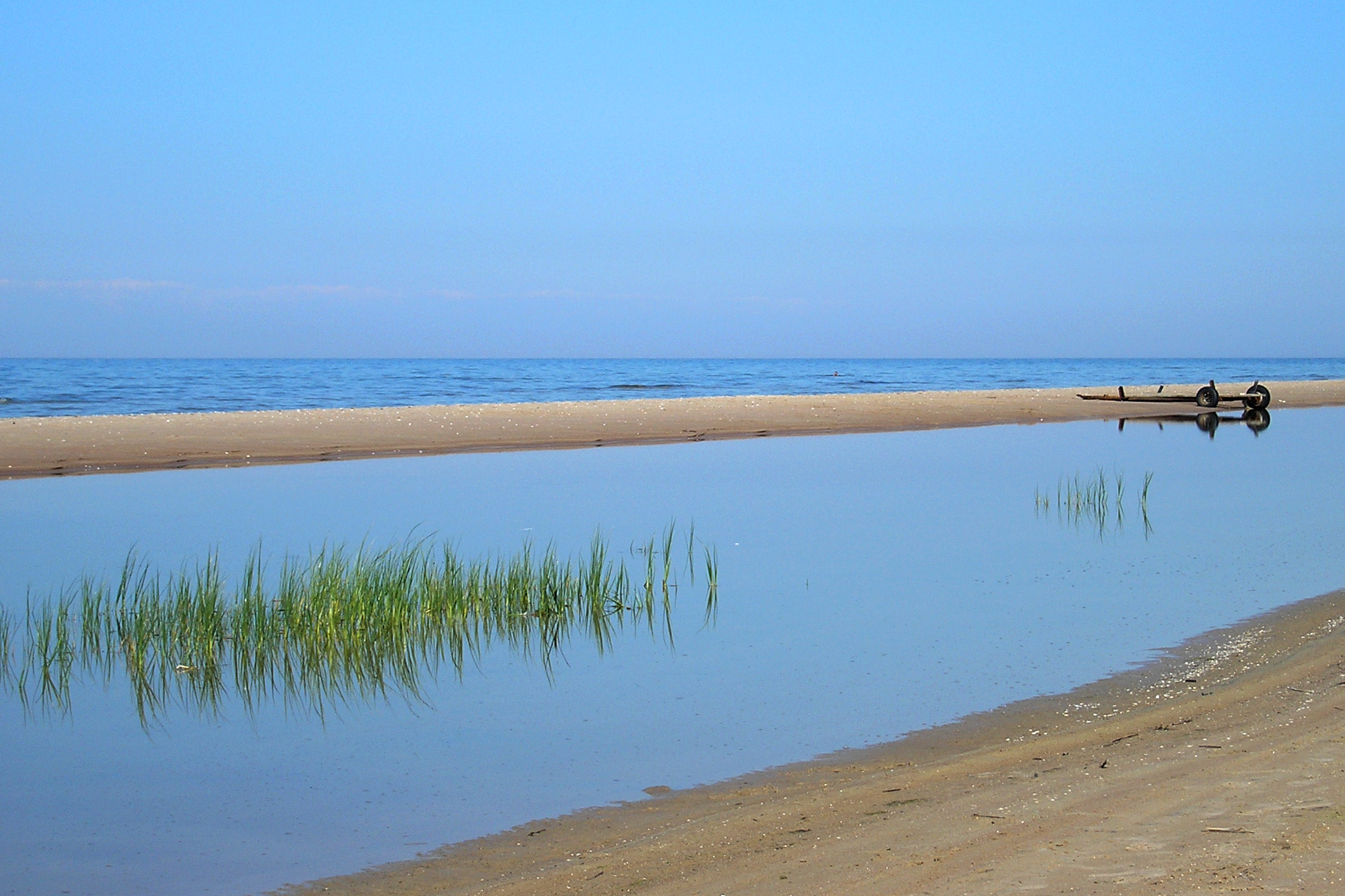 Cape Kolka, Latvia